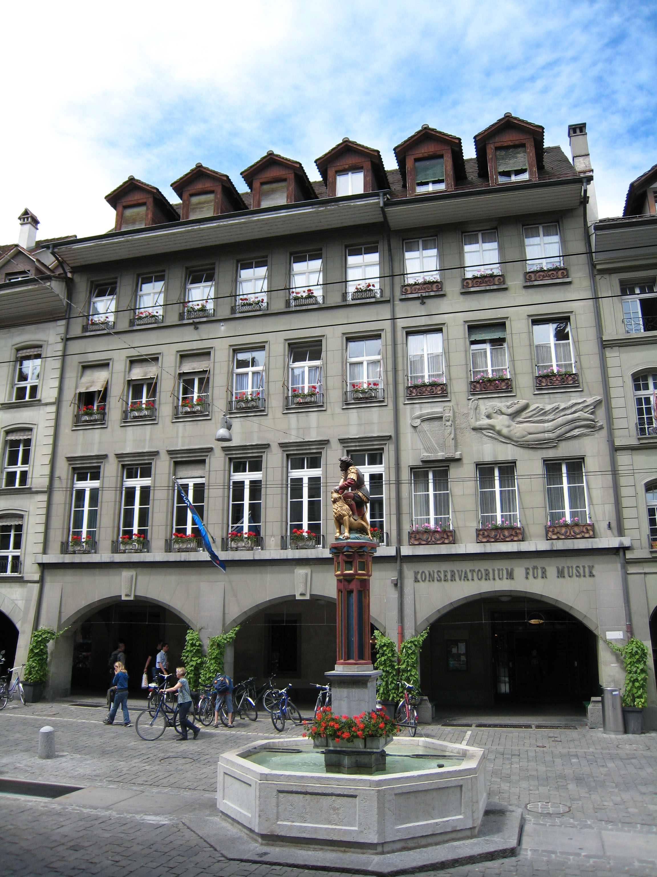 Konservatorium für Musik – Sandsteinrelief Musika mit Harfe von Jakob Probst (1880–1966) an der Hausfassade und Simonbrunnen von Hans Gieng (ca. 1505–1562) im Vordergrund – an der Kramgasse 36 in der Altstadt von Bern, Schweiz.